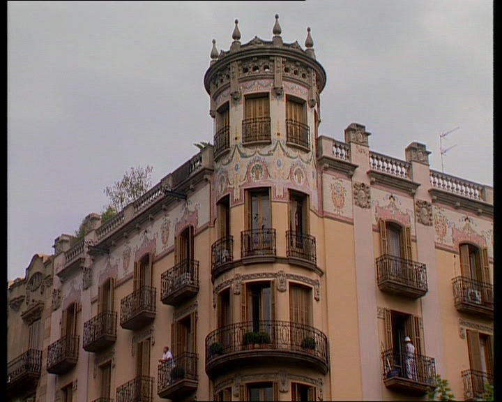 Casa Cuyàs Ferrer obra de 1914 d'Antoni Millas i Figuerola. Detall dels mosaics de Lluís Bru. Barcelona(Catalunya)